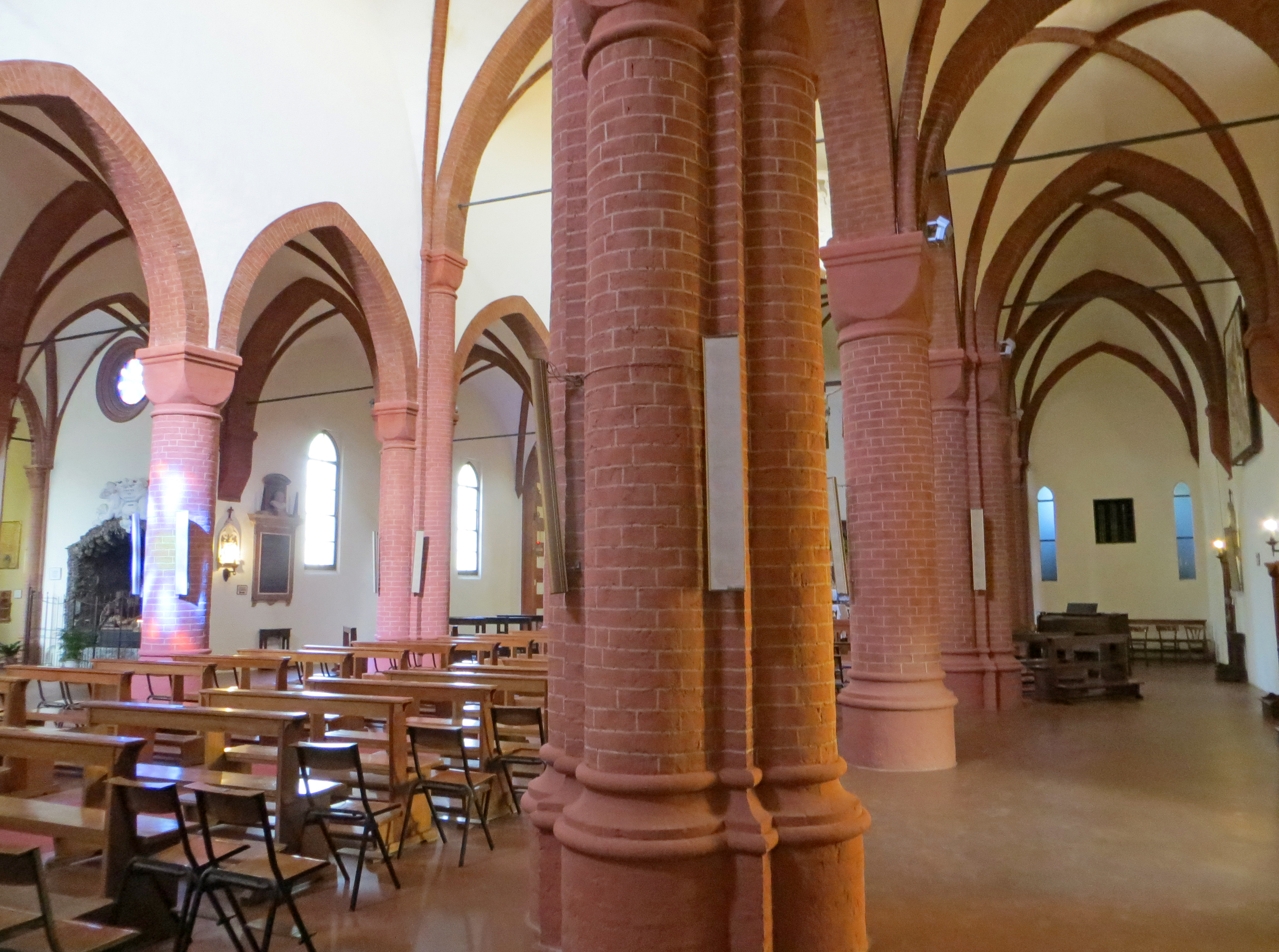 Chiesa di Santa Maria degli Angeli (Busseto) - navata destra e centrale